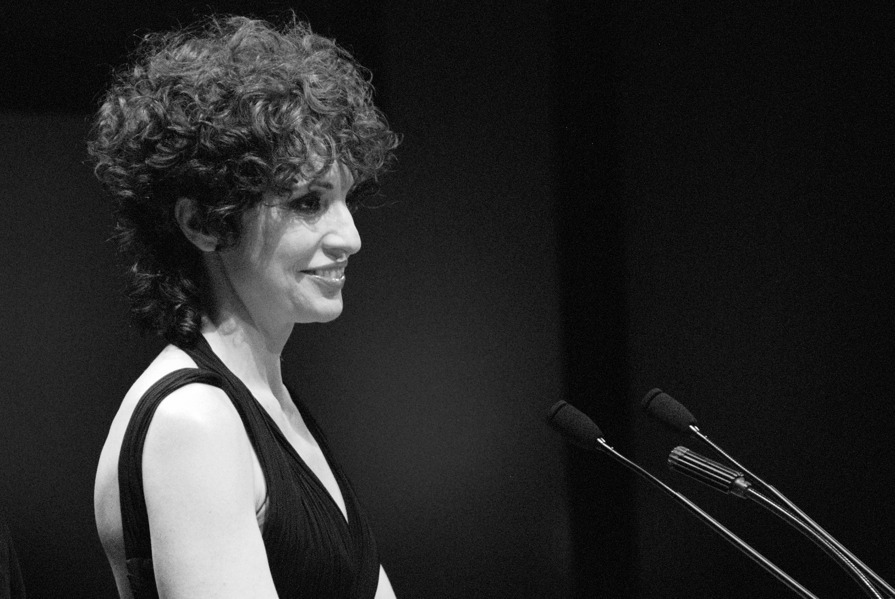 Adriana Ozores presentando el Premio Málaga del Festival de Cine Español de Málaga en la edición de 2009.